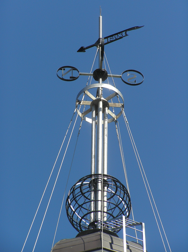 Kula czasu na wieży latarni w Nowym Porcie w Gdańsku